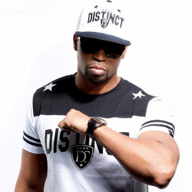 Rohff Distinct